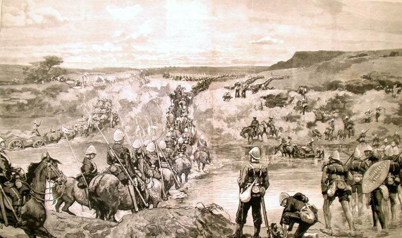 L'armée anglaise entre au Zululand. gravure de 1879